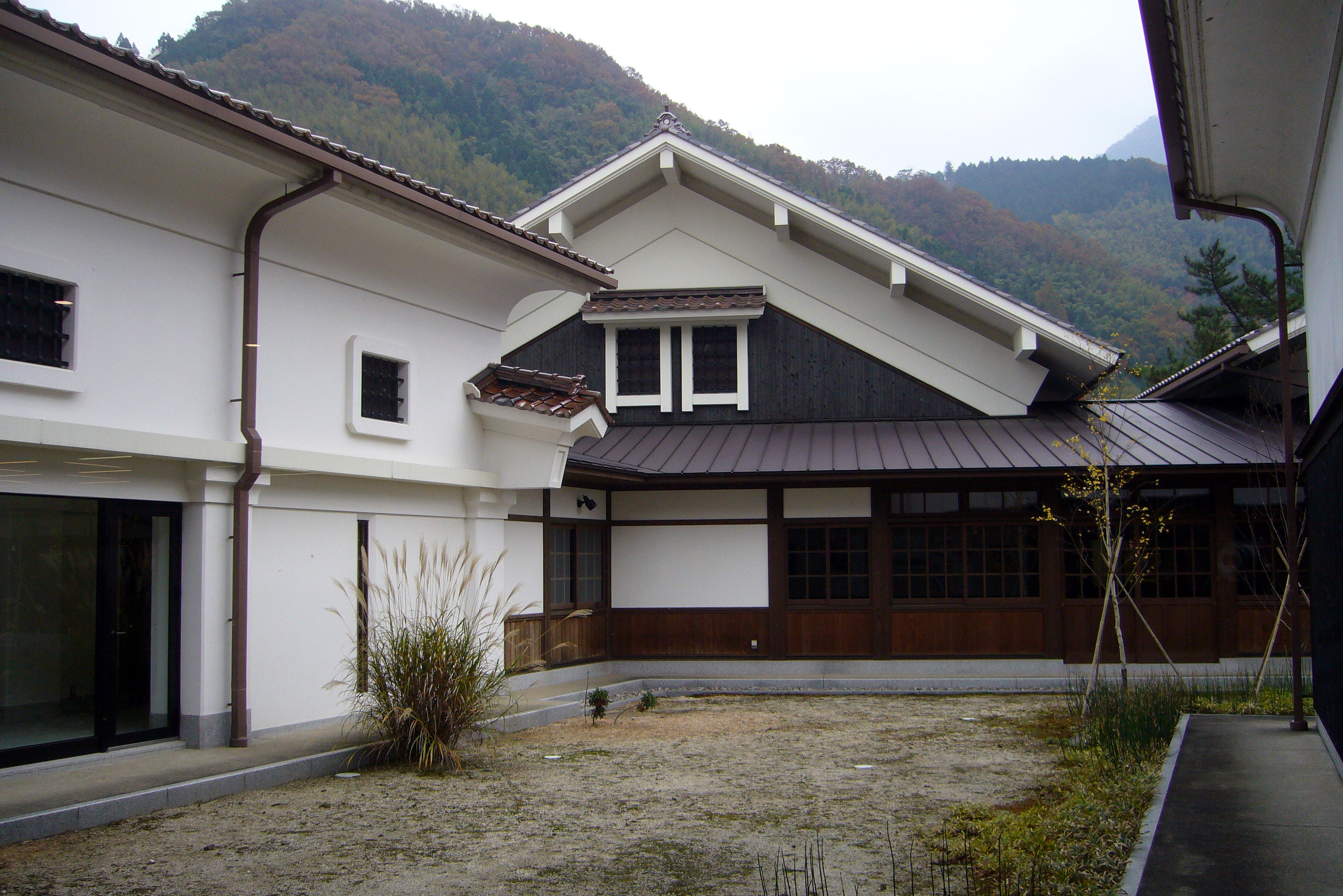 Anno Art Museum